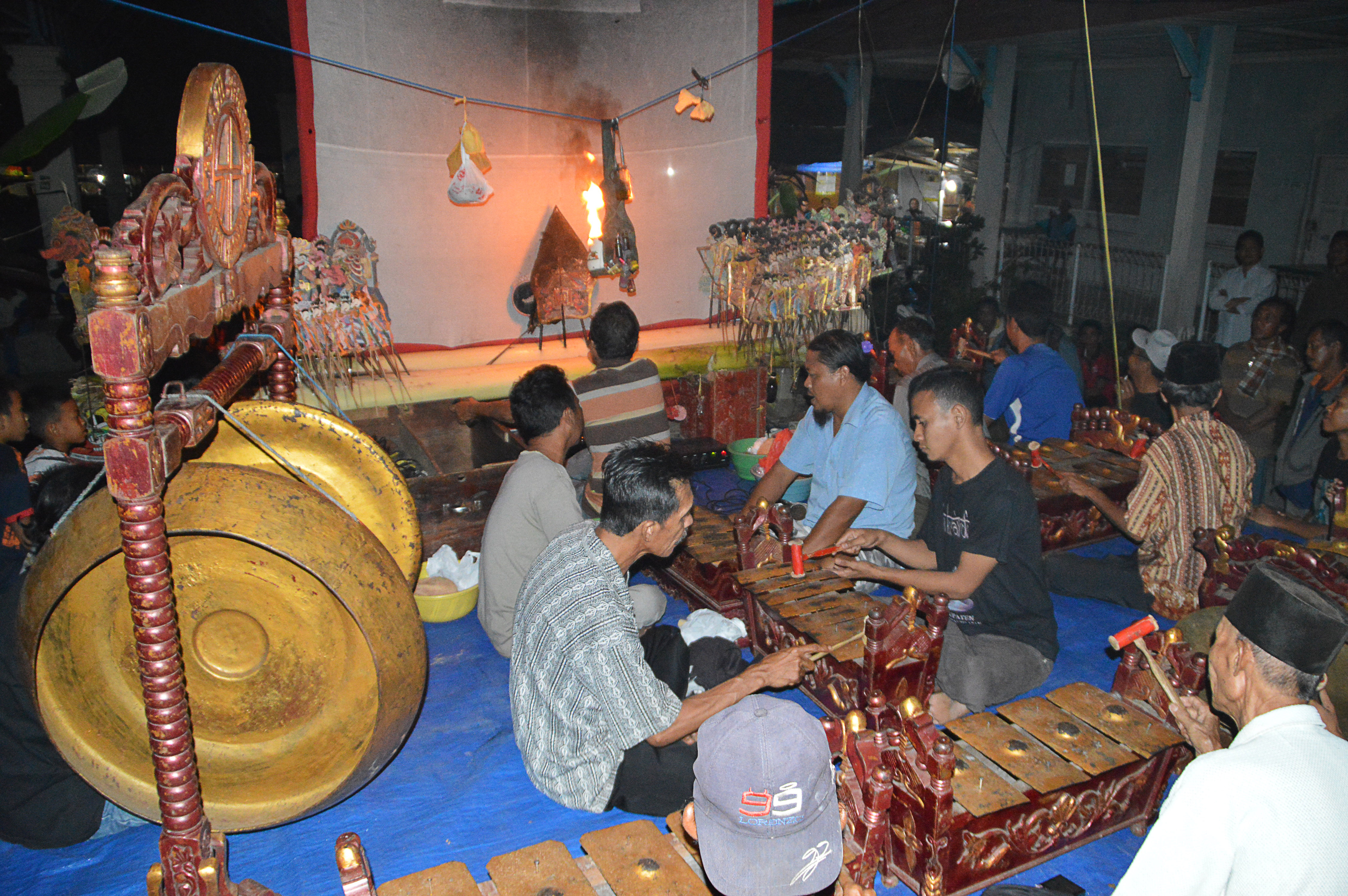 Pertunjukan Wayang Banjar oleh Sanggar Seni Asam Rimbun desa Pantai Hambawang Timur, Kabupaten Hulu Sungai Tengah.